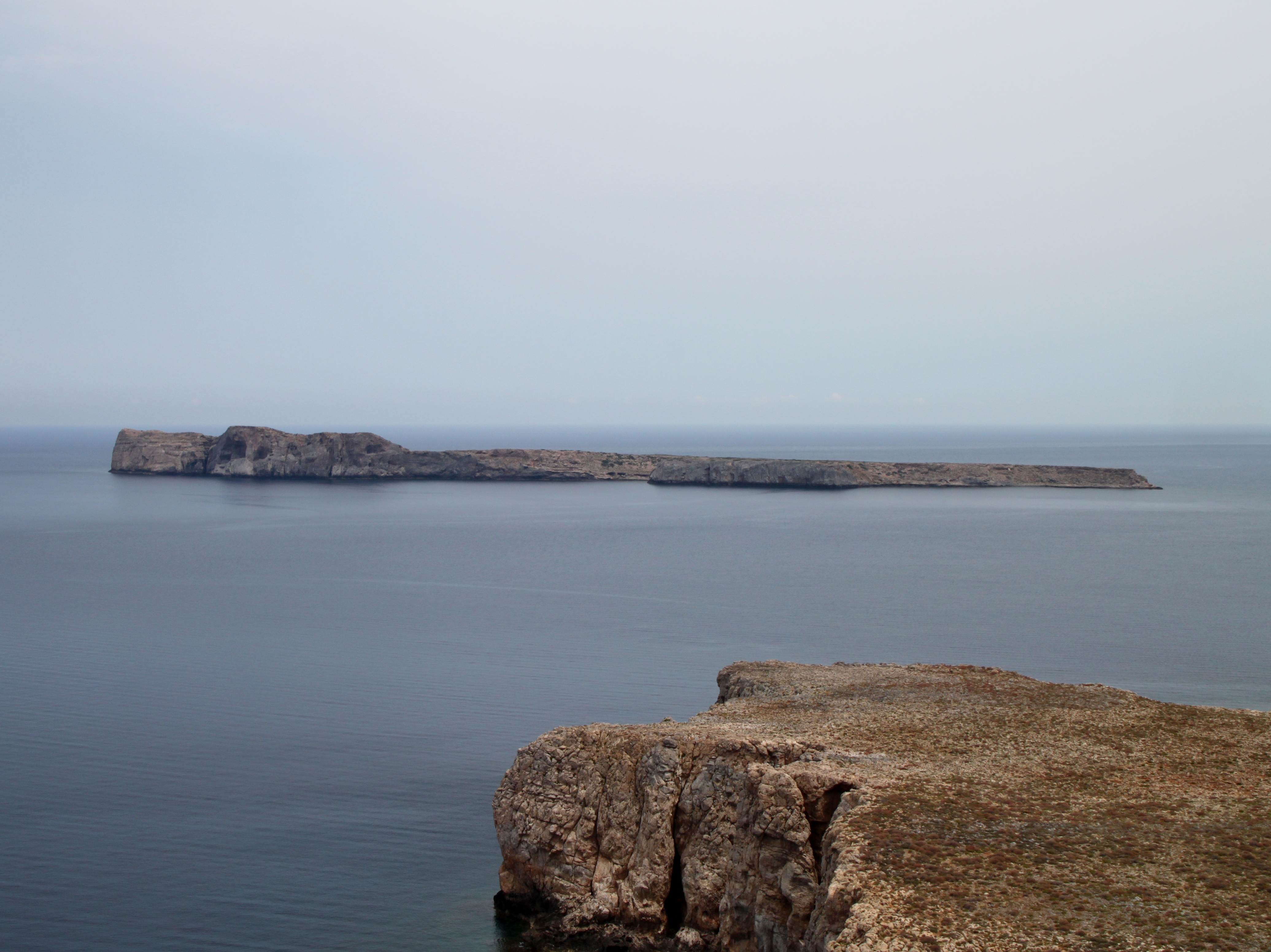 Agria Gramvousa (Άγρια Γραμβούσα), Insel in der Gemeinde Kissamos, Regionalbezirk Chania, Kreta, Griechenland